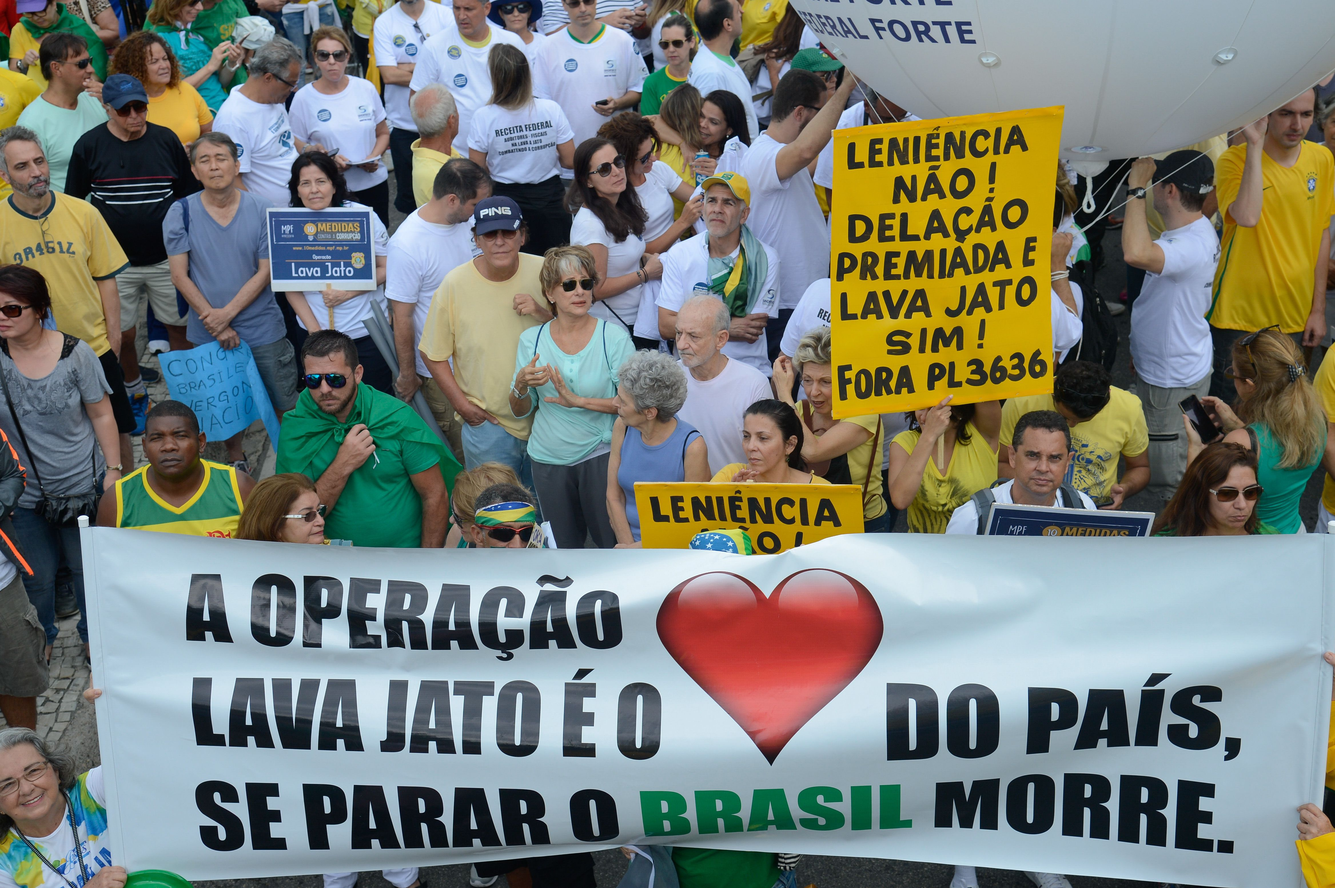 Manifestação em favor da operação Lava Jato , na praia de Copacabana, Rio de Janeiro, na manhã de 4 de dezembro de 2016. Dos cartazes legíveis, um diz "Congresso brasileiro vergonha nacional" e outro "Leniência não! Delação premiada e lava jato sim! Fora PL 3636". No cartaz em primeiro plano, lê-se: "A Operação Lava Jato é o ❤ [coração] do Brasil. Se parar o Brasil morre."